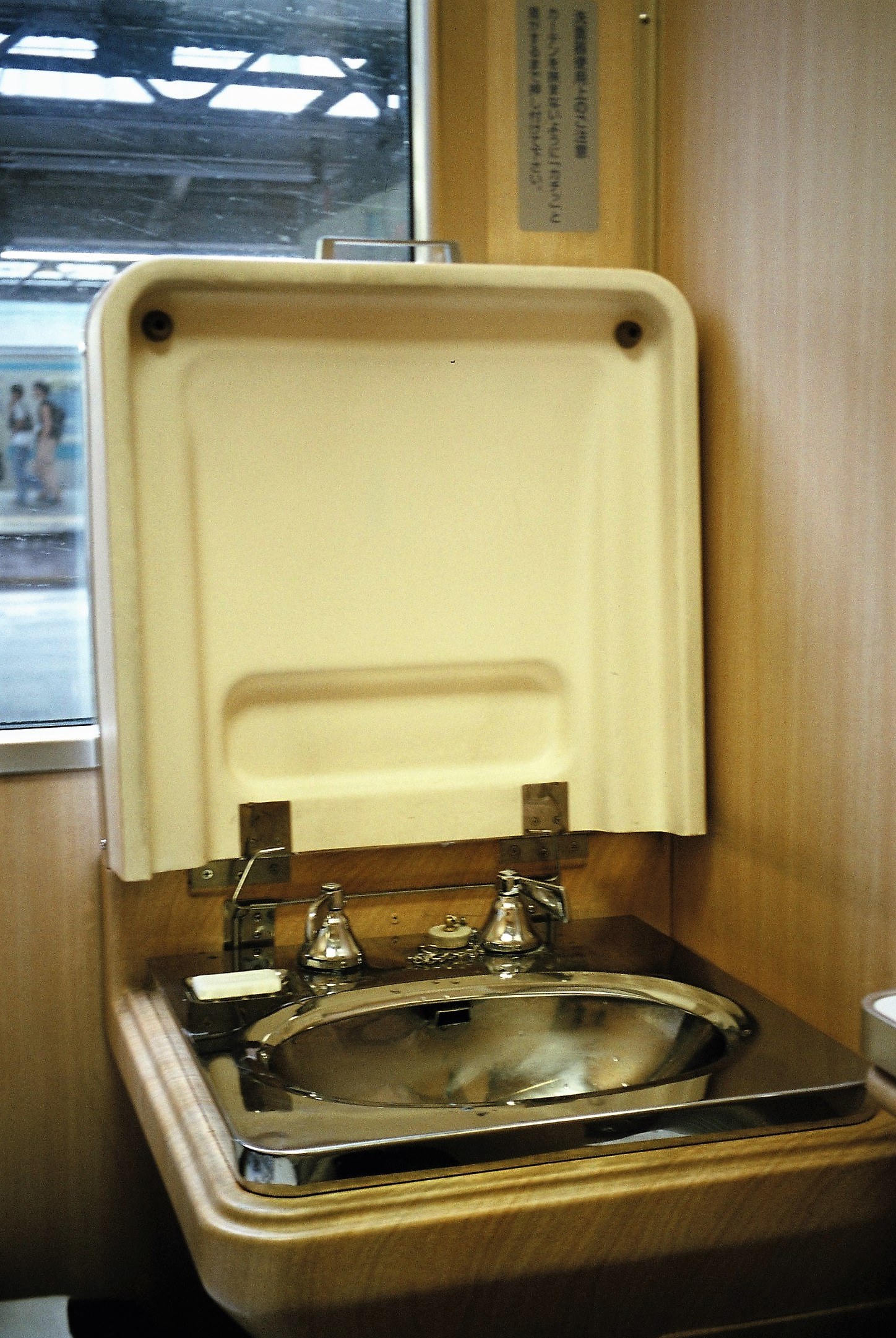 A個室寝台（シングルデラックス）に備え付けられた洗面台（2004年8月、寝台特急富士）